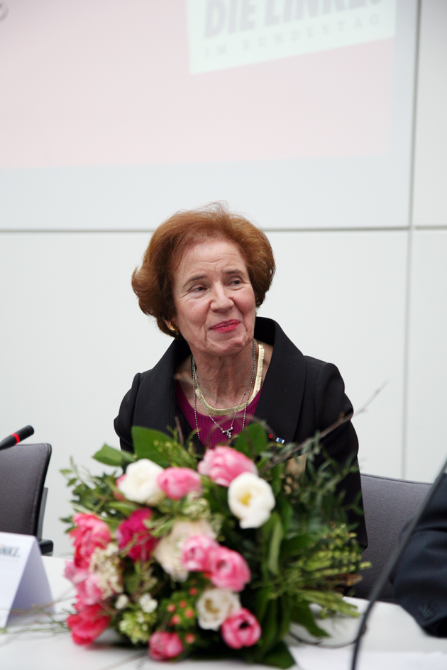 Beate Klarsfeld. Originale Bildbeschreibung: Die Bundesversammlung hat Gauck zum Prsädienten gewählt, Beate Klarsfeld erhielt 126 Stimmen - drei mehr, als DIE LINKE Mandate hatte.